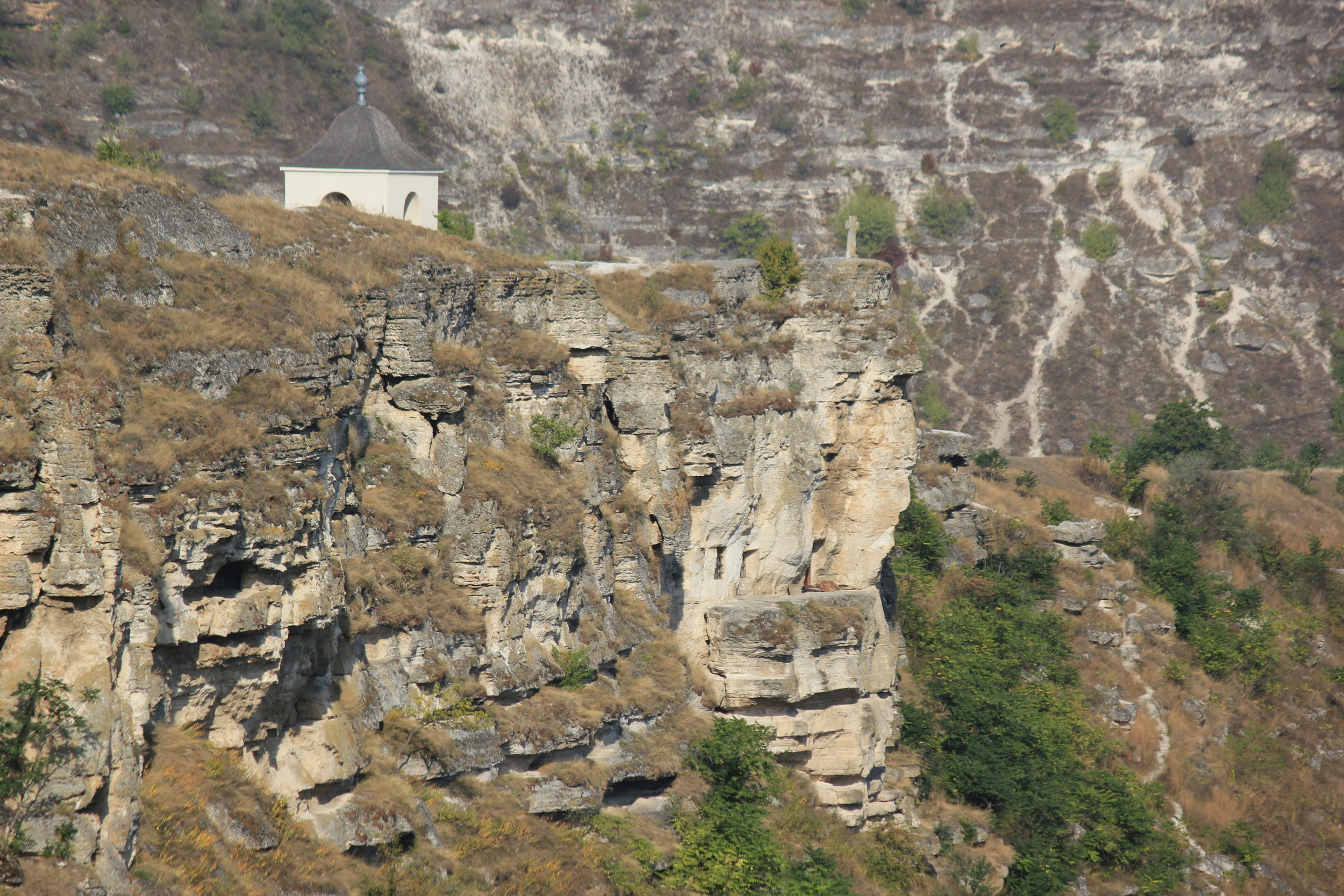 Hornjoserbsce: Wudrjeńca rěki Raut pola Orhei Vechi, stareho klóštra, zapisaneho do swětoweho kulturneho herbstwa UNESCO.